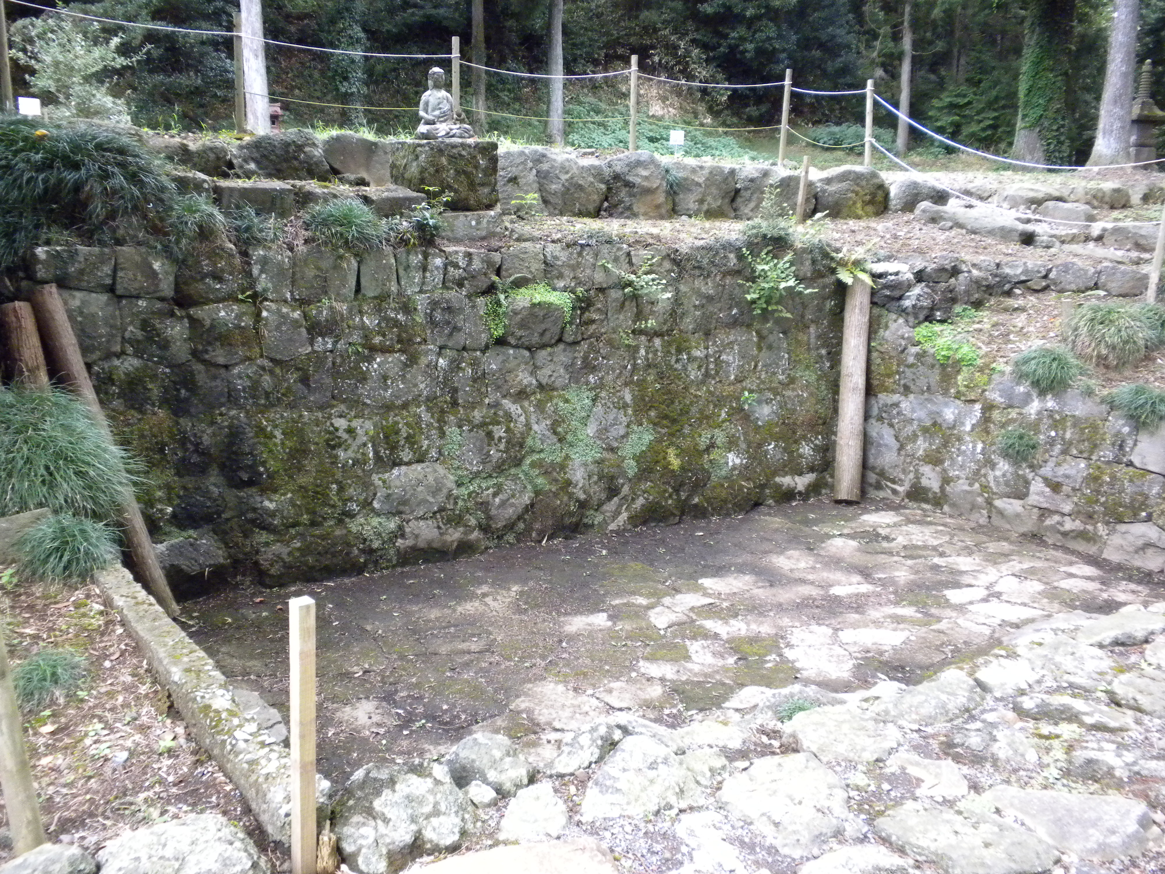 村山浅間神社の水垢離場（静岡県富士宮市）